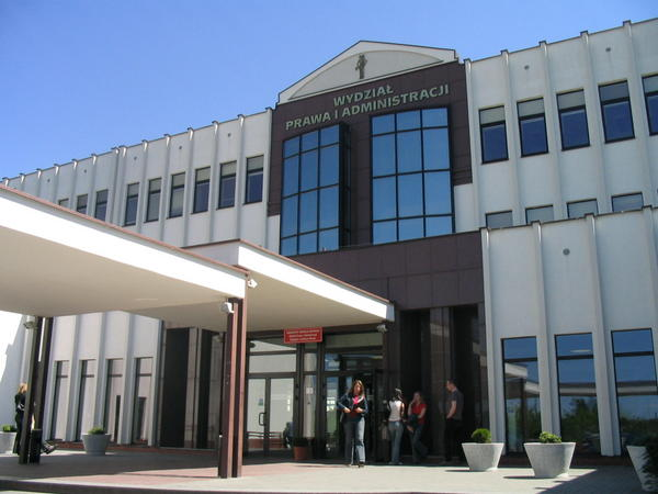 Wydział Prawa UMK w Toruniu